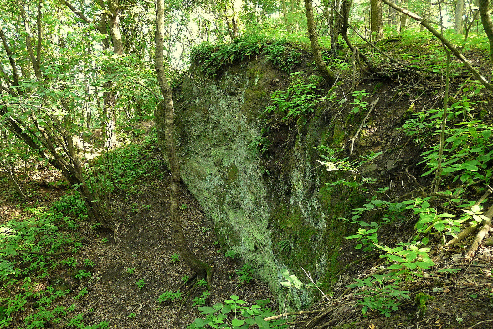 Bývalý lom na Skalce